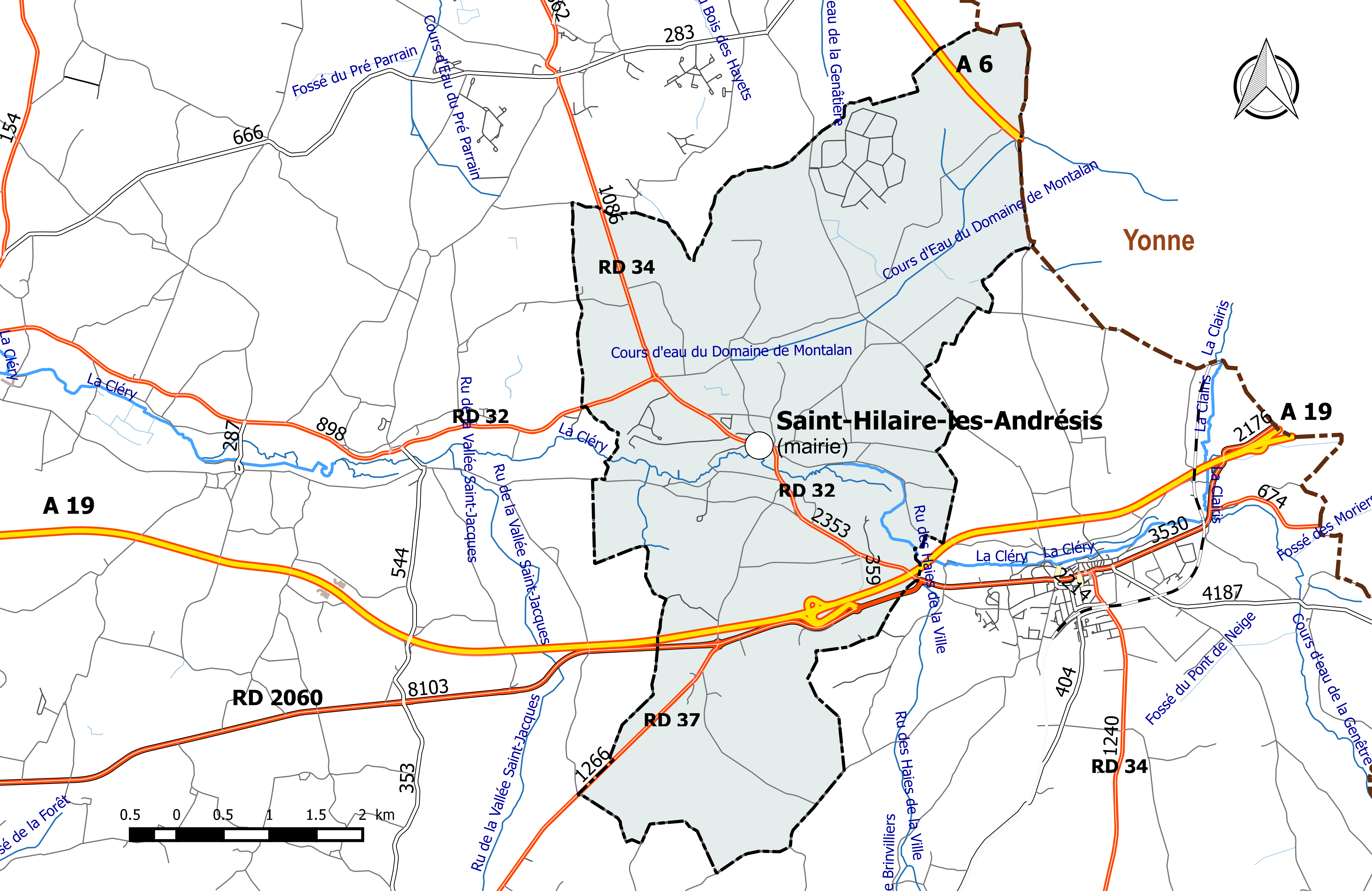 Carte du réseau routier de la commune de Saint-Hilaire-les-Andrésis.